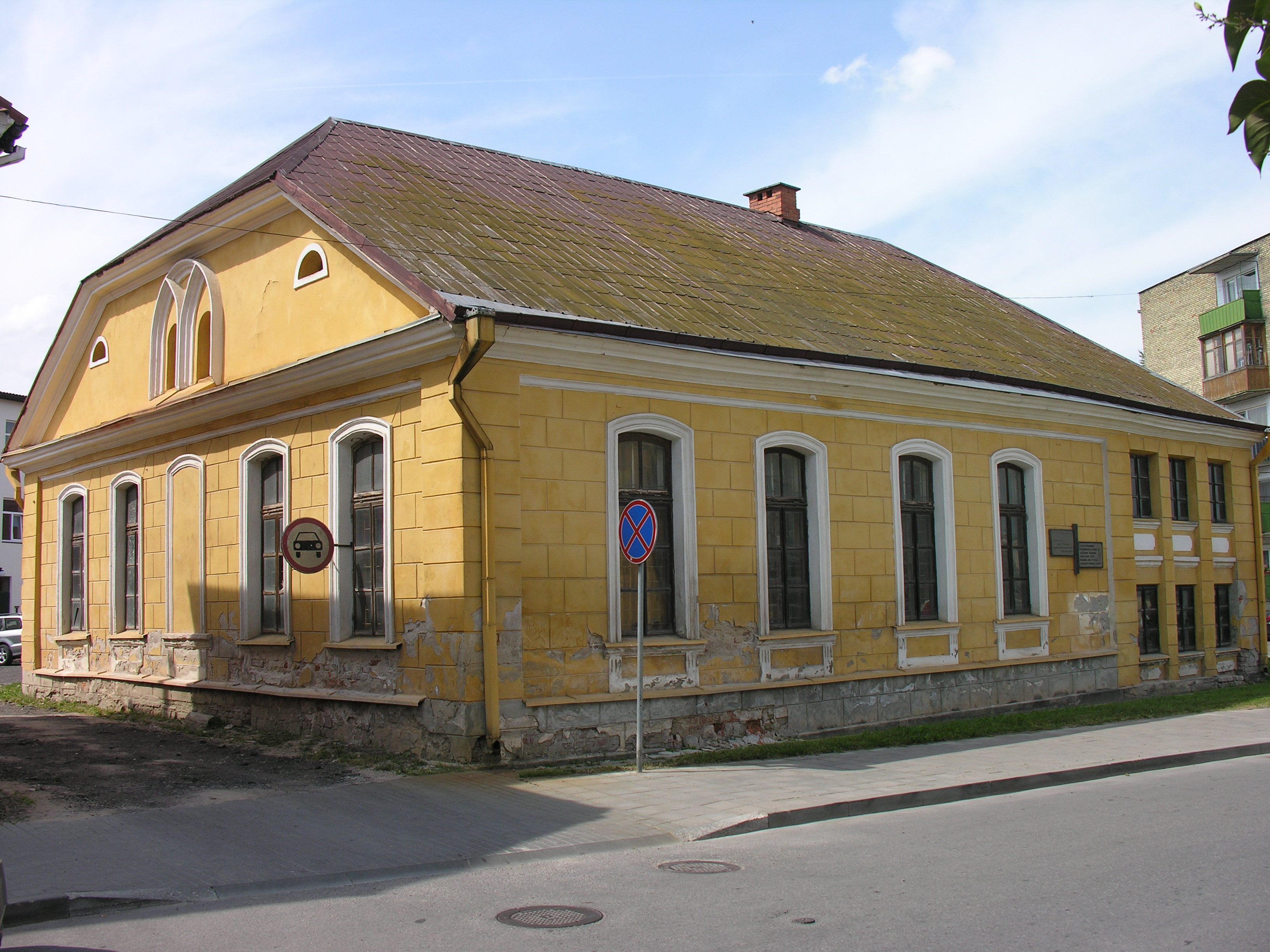 Kiejdany. Synagoga, ul. Smilgos